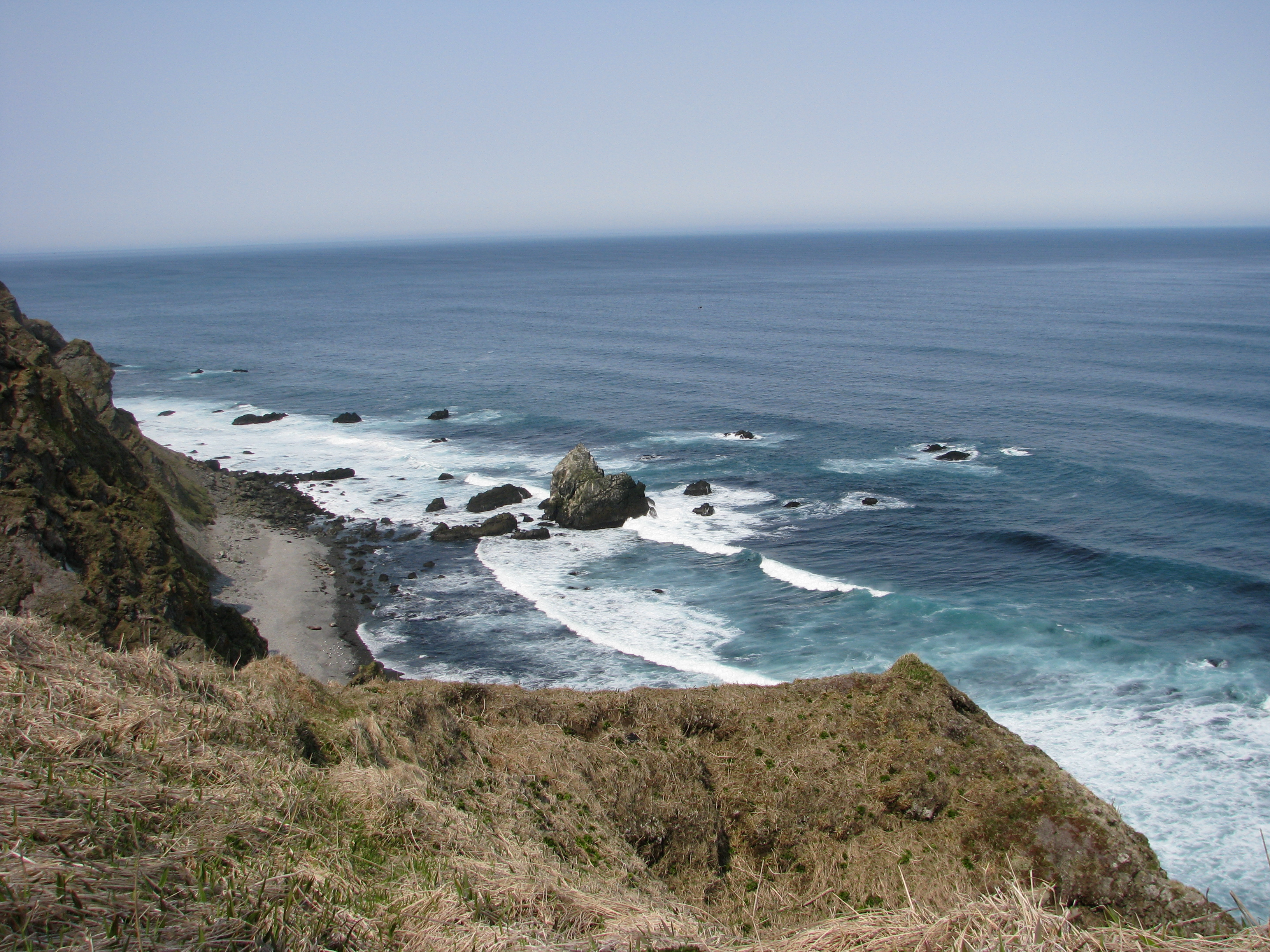 Командорский заповедник, Алеутский район This image is related to the protected area of Russia number 4100007